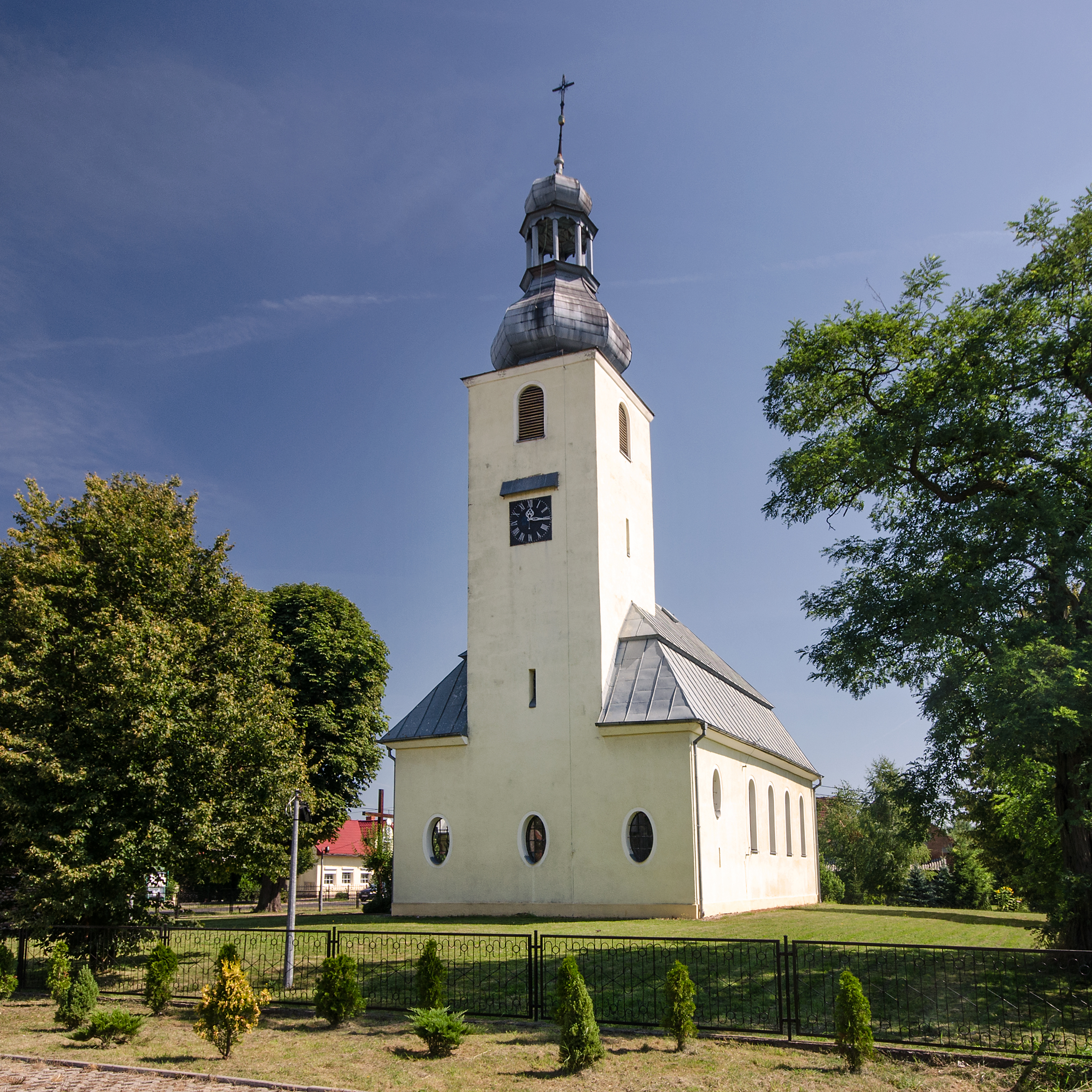 Kotowice, kościół par. p.w. św. Marcina, 1911